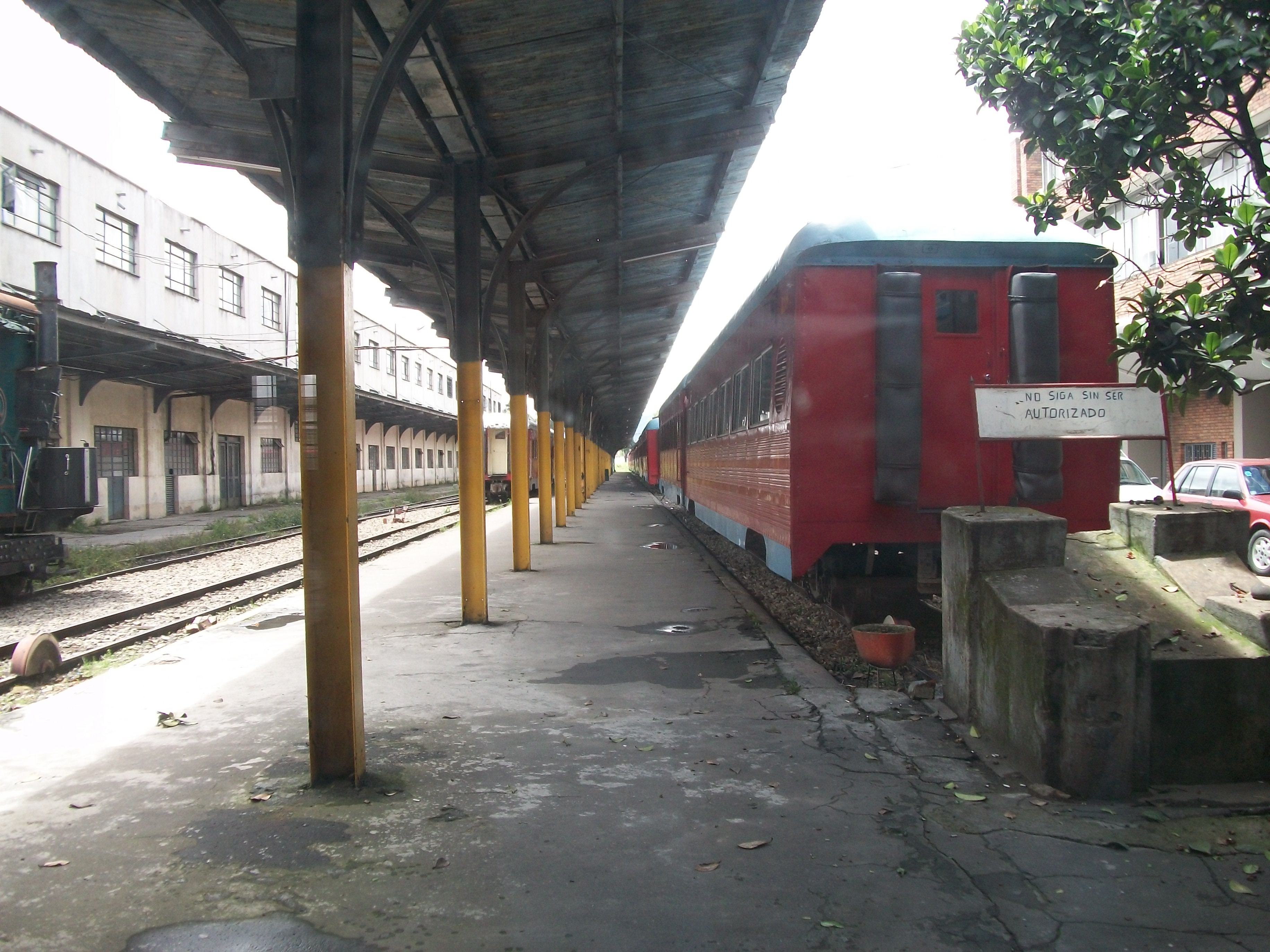 Andén de la Estación de la Sabana, en Bogotá, inaugurada el 20 de julio de 1917.